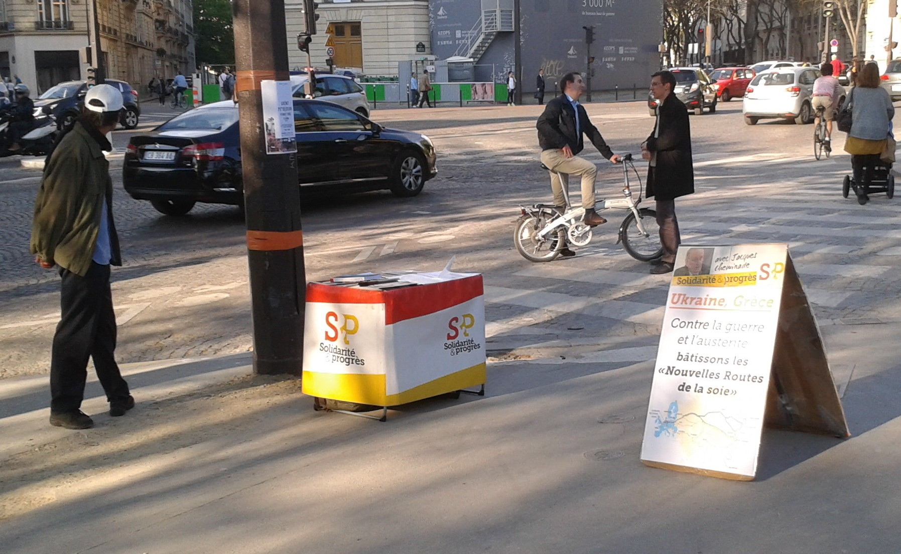 Une table tenue dans une rue de Paris par un militant du mouvement "Solidarité et Progrès"